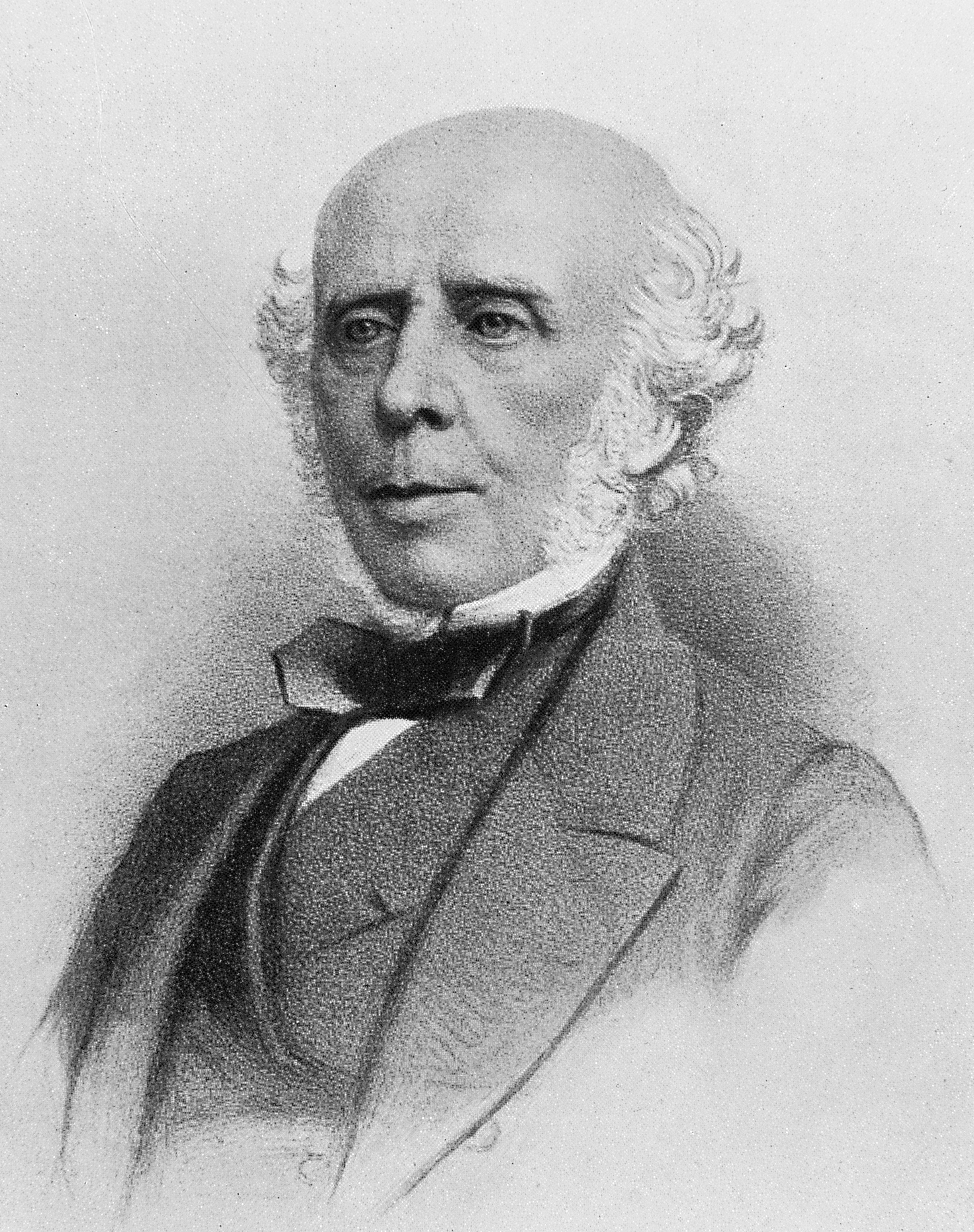 William Mackenzie (1791-1868)